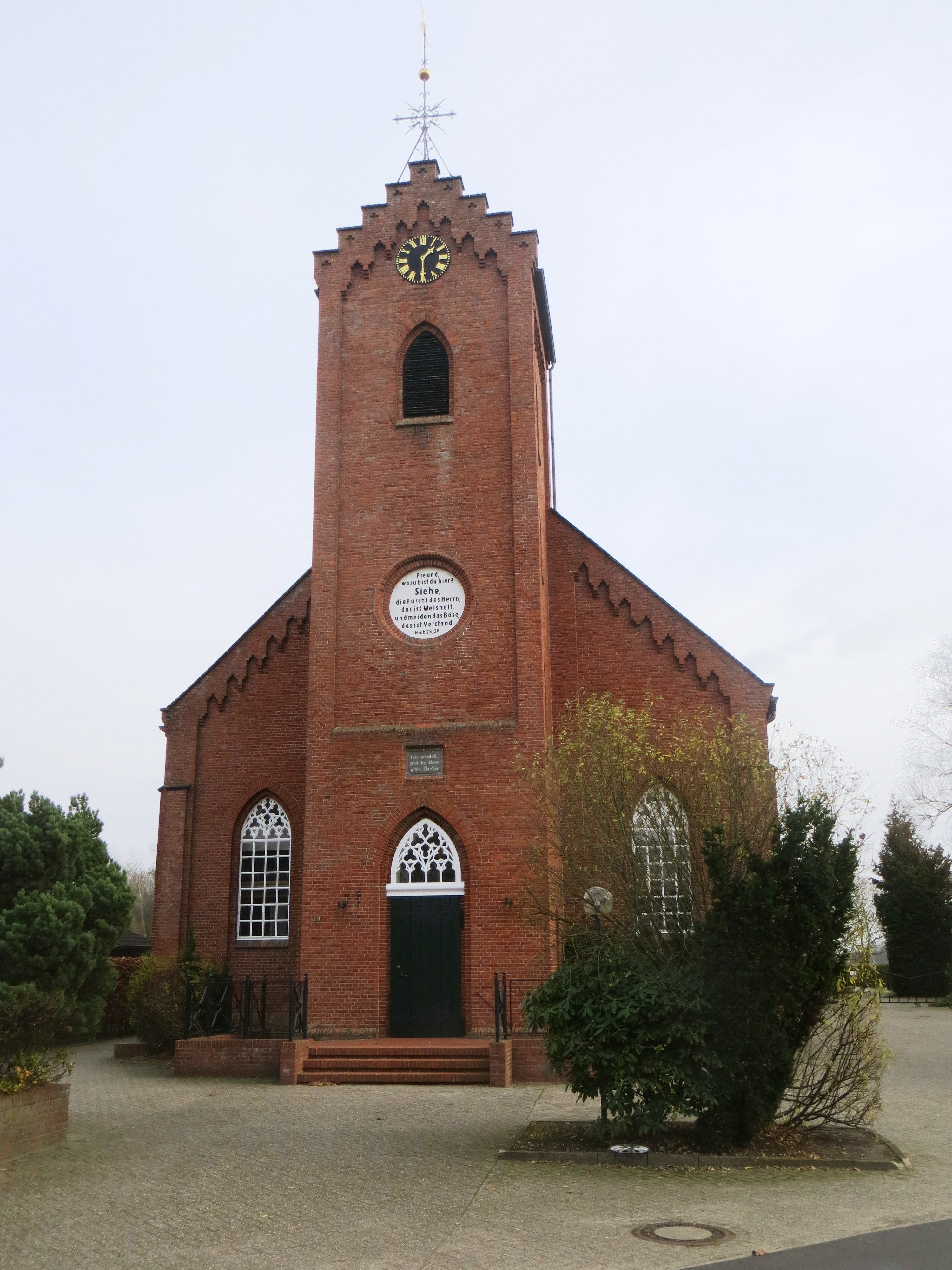 Kerk van Holthusen (Weener)